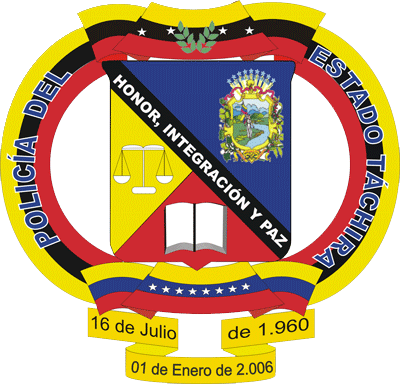 Descripción Heráldica: Escudo terciado en Cotiza. En campo de azul. Armas del Estado Táchira. Cotizado de sable con lema escrito en letras de plata que dice: “HONOR, INTEGRACIÓN Y PAZ ”. Campo inferior tajado. En campo de oro una balanza . En campo de gules, un libro abierto de plata. Por timbre una cinta tricolor con siete estrellas de plata. Cinta de oro al pié del arma con las inscripciones: “16 JULIO 1960, DIRSOP” Significado: El escudo adopta la forma del escudo de Armas de la República. Los colores que forman su estructura esencial, son los colores nacionales. La jurisdicción esta representada en las armas enclaustradas del Estado Táchira, sobre campo de azur. Los demás elementos y piezas simbolizan la justicia y el ideal de superación que caracterizan al Cuerpo de Seguridad Pública del Estado Táchira, a saber: Esmaltes: Oro: nobleza, magnanimidad y constancia frente al peligro. Plata: Integridad, obediencia, firmeza y vigilancia.Colores: Gules: Valor, atrevimiento, intrepidez, fortaleza, victoria, osadía, ardid. Color de los guerreros, fuerza de brazo y nobleza de espíritu. Azul: Justicia, celo, verdad, lealtad y serenidad.Sable: Prudencia, rigor, obediencia y honestidad. Figuras o Piezas Artificiales: Cotiza: Derivado de la banda, símbolo de cualquier fuerza armada. Balanza: Equidad y justicia. Libro Abierto: Deseo de superación técnico-profesional, dentro de las funciones esencialmente Policiales y de Seguridad del Estado. Una cinta tricolor con siete estrellas de plata: utilizada por timbre, como símbolo máximo de nuestra Patria. Una cinta de oro con letras de sable: colocada al pie del arma como base, con las inscripciones “16 JULIO 1960”, fecha de Decreto N° 67, emanada del poder Ejecutivo del Estado Táchira, por medio del cual se crea las Fuerzas Armadas Policiales del Estado y las iniciales: “DIRSOP”